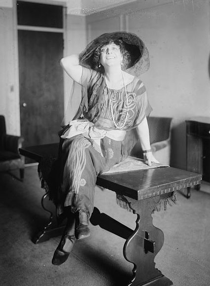 Rosina Storchio, Italian soprano